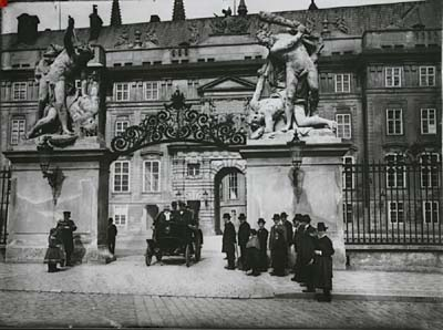 Ukázka díla Rudolfa Brunnera Dvořáka